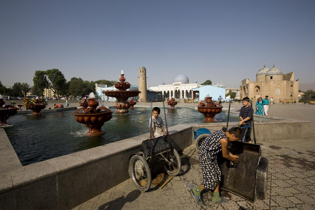 Khujand, Tajikstan